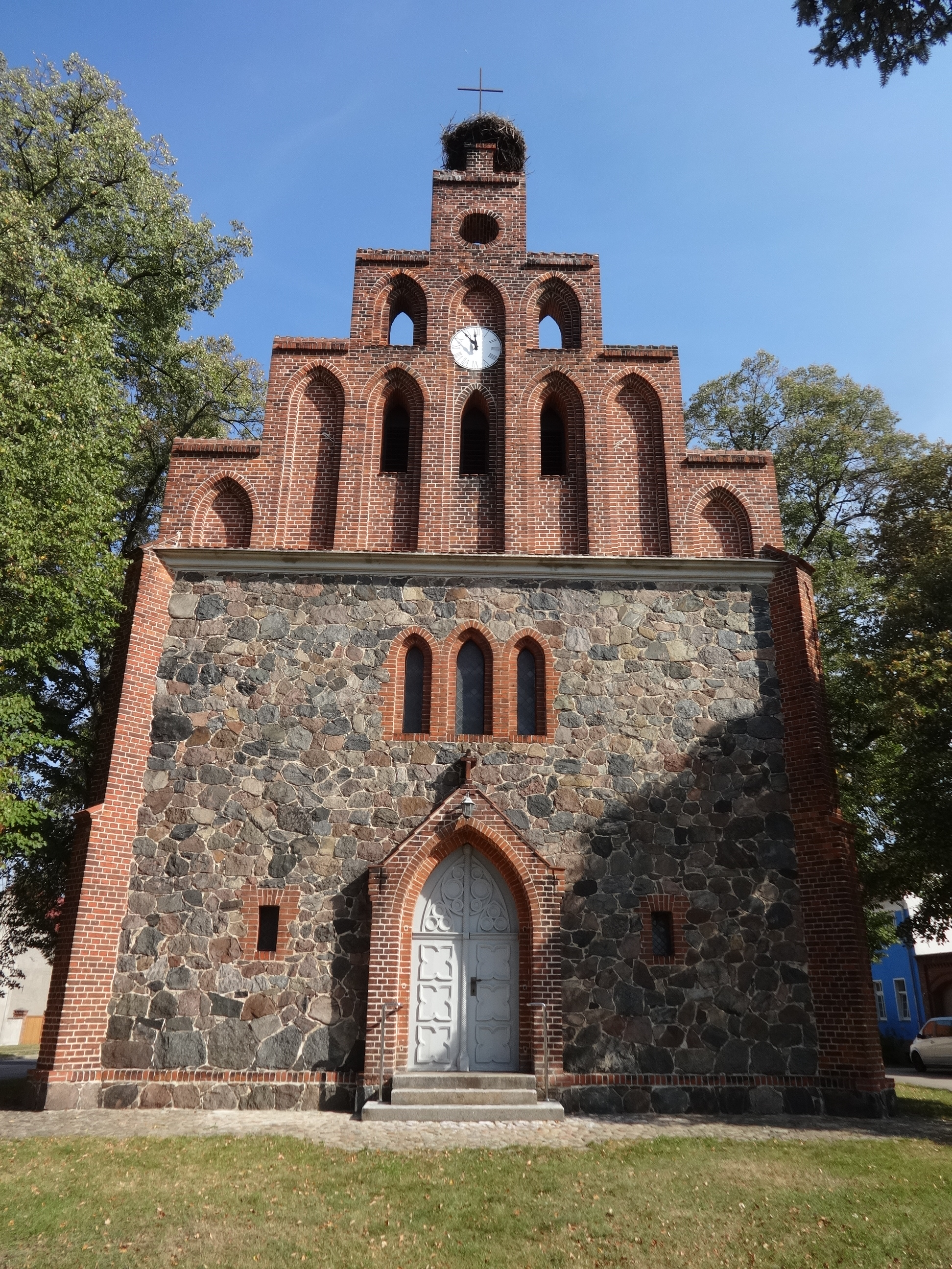 Die evangelische Dorfkirche in Hennickendorf ist eine neugotische Feldsteinkirche in Hennickendorf, ein Ortsteil der Gemeine Nuthe-Urstromtal in Brandenburg. Das Bauwerk entstand 1856 bis 1858 nach Plänen von Stüler vermutlich auf dem Fundament eines Vorgängerbaus aus dem 14. Jahrhundert.